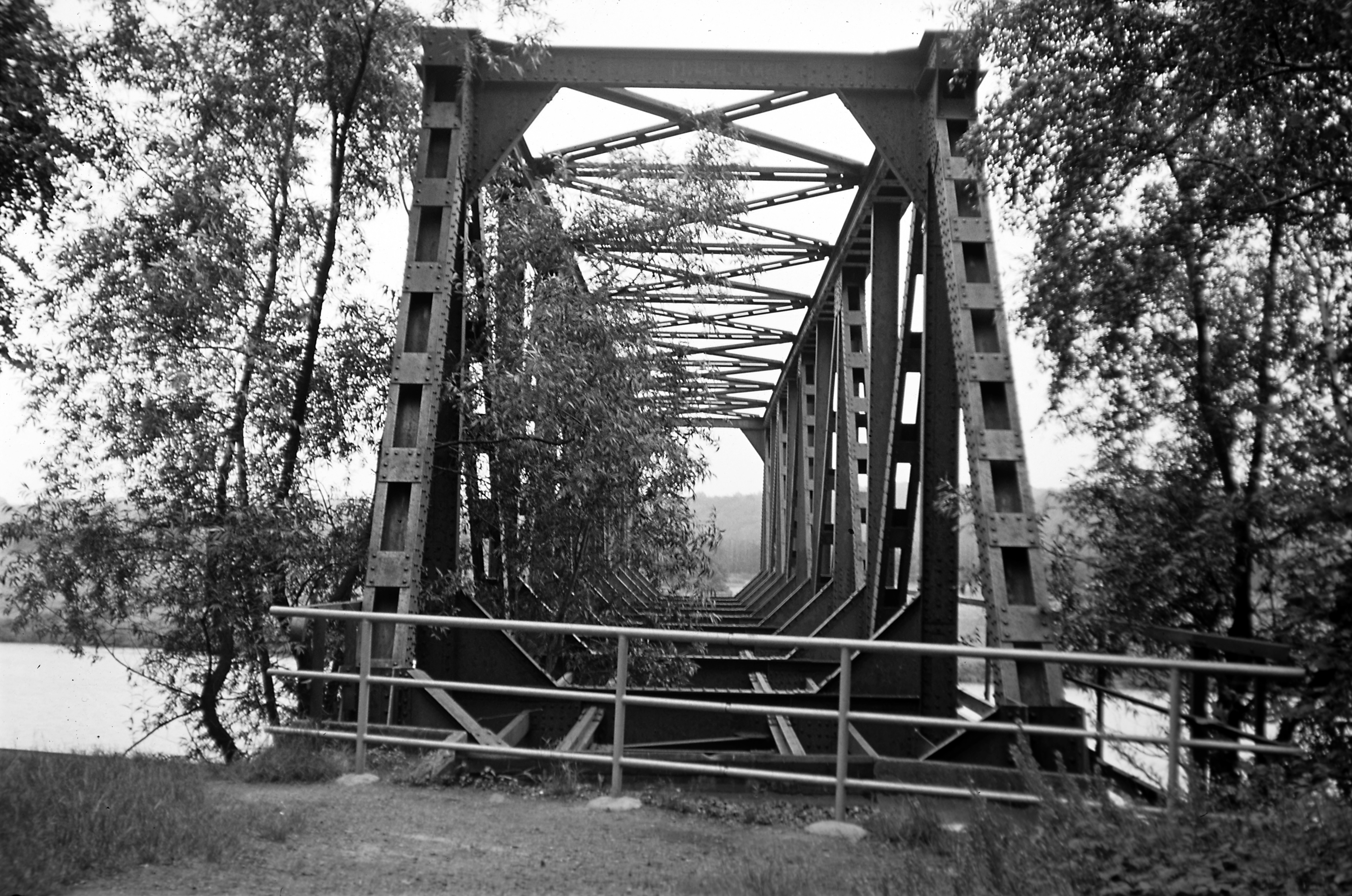 Der letzte erhaltene Überbau, aus Richtung Grimma unt Bf. Er stammt von 1931, nach der Sprengung am 15. April 1945 und der Reparatur des Brückenzuges ist die Brücke wegen Mangel an Oberbaumaterial nicht wieder genutzt worden.